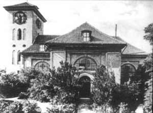 Трагхаймская кирха (нем. Tragheimer Kirche) — лютеранская кирха в Трагхайме (Кёнигсберг). Основана в 1624 году. Первое здание построено в 1632. В 1710 построено новое здание по проекту архитектора Шультхайса фон Унфрида. 24 ноября 1836 года в кирхе состоялось венчание композитора Рихарда Вагнера с артисткой Минной Планер. Кирха находилась под патронажем Короля Пруссии